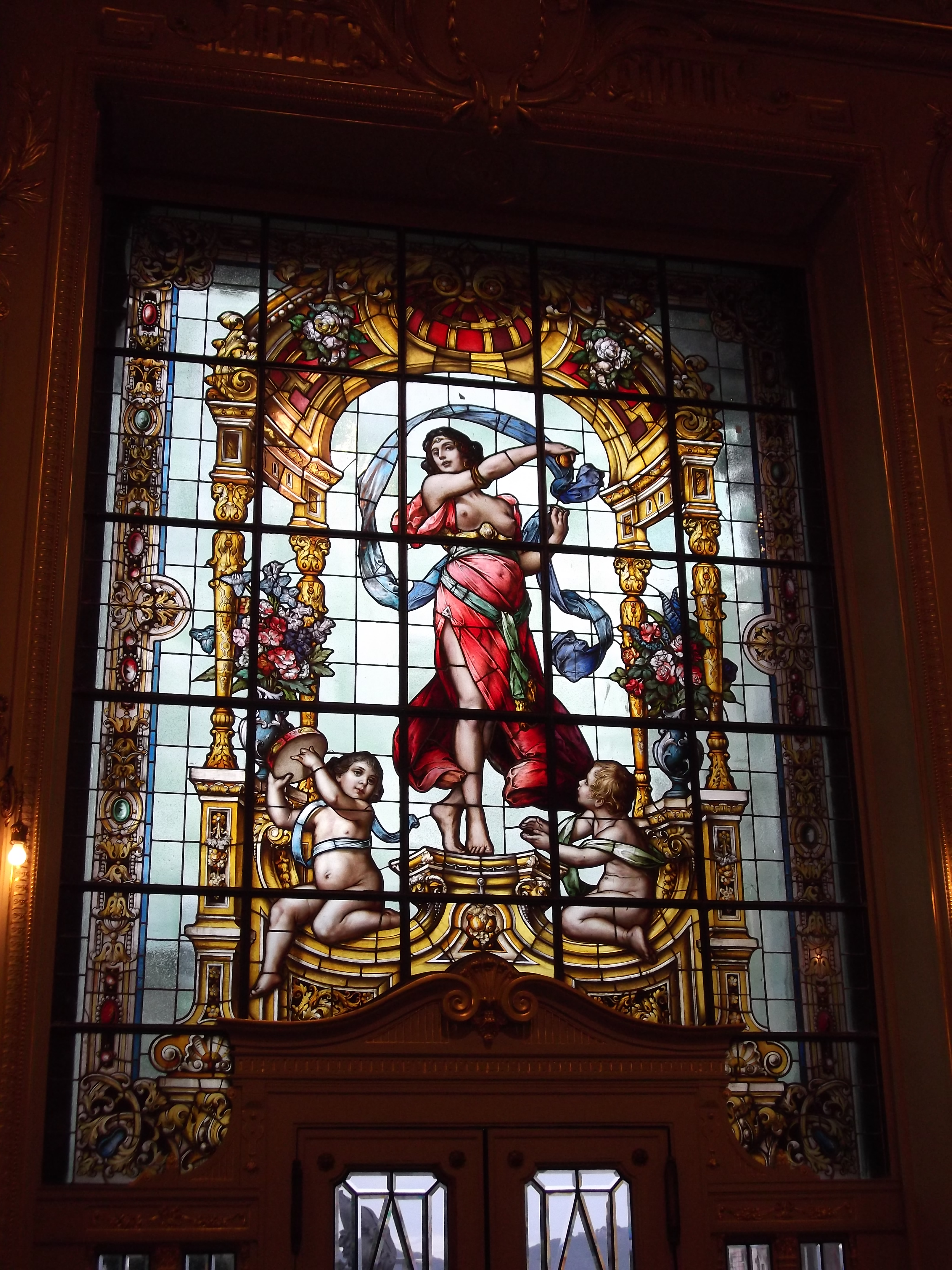 Teatro Municipal do Rio de Janeiro : Vitral Personificação da Dança